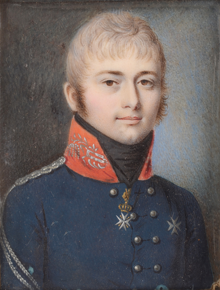 Князь Пётр Петрович Долгорукий (1777-1806)